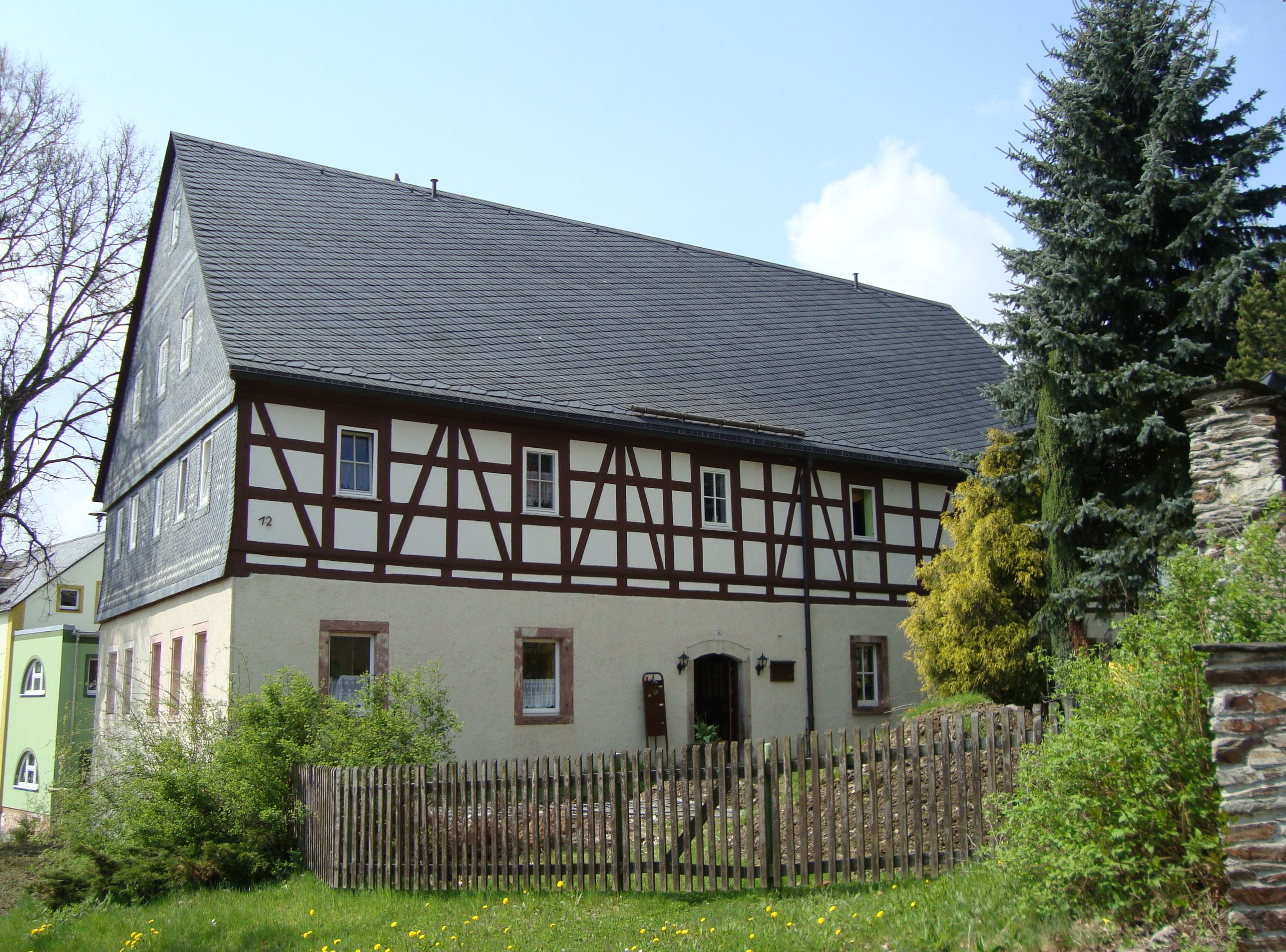 Pfarrhaus in Dorfchemnitz im Erzgebirge, Geburtshaus von Samuel von Pufendorf (am Pfarrhaus befindet sich eine Gedenktafel)